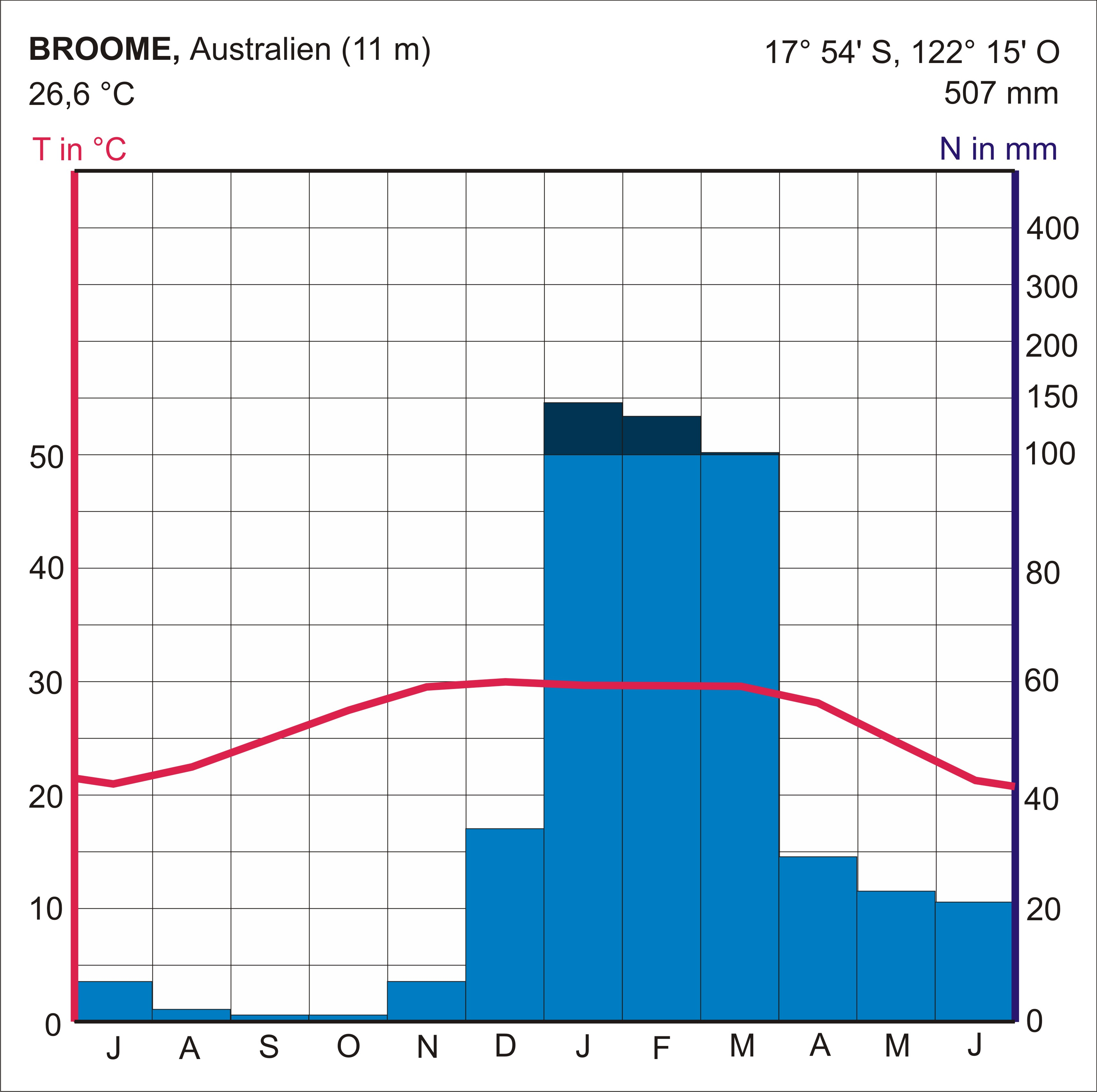 Klimadiagramm von Broome in Nordwestaustralien